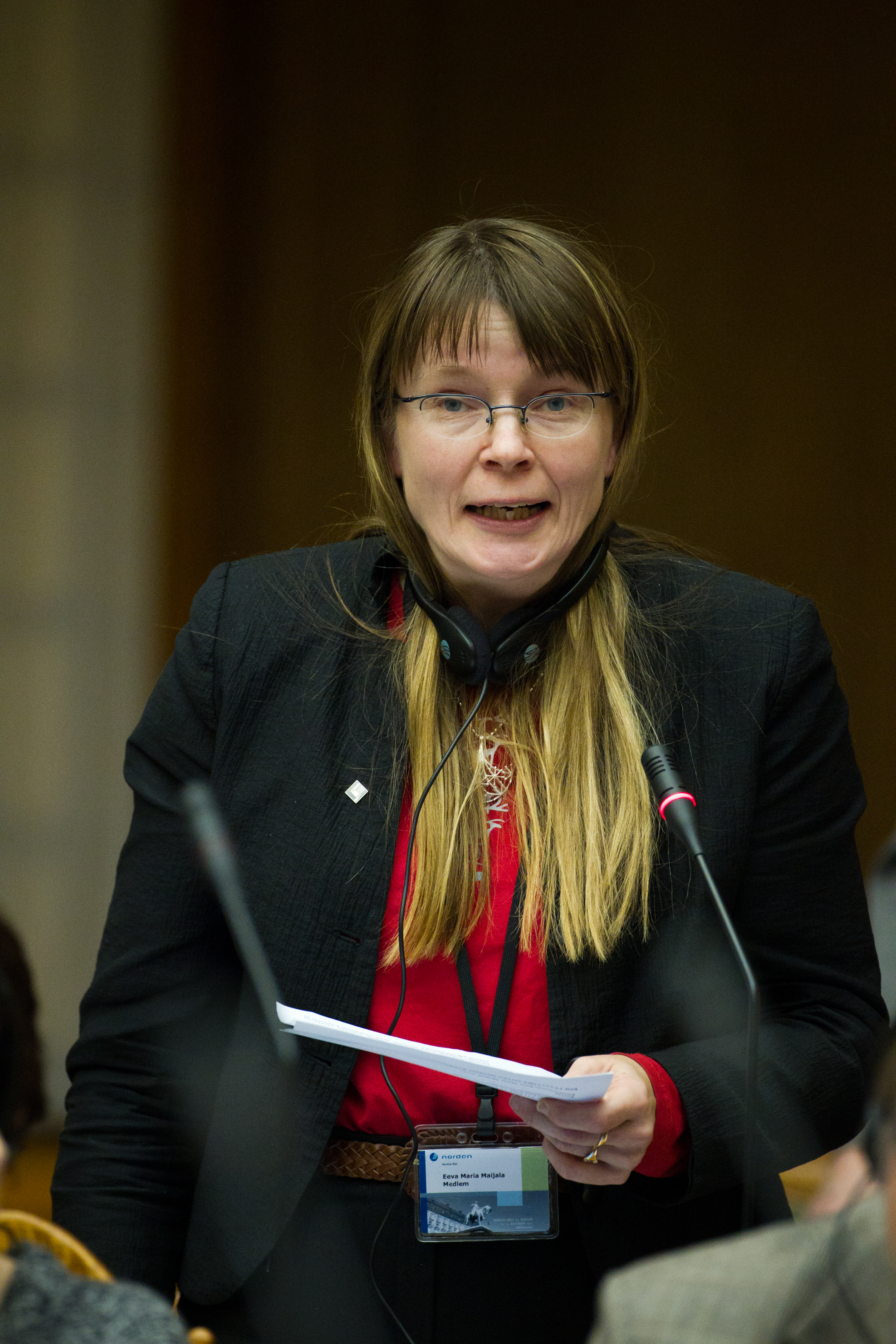 Eva Maria Maijala vid Nordiska Rådets session 2011 i Köpenhamn.